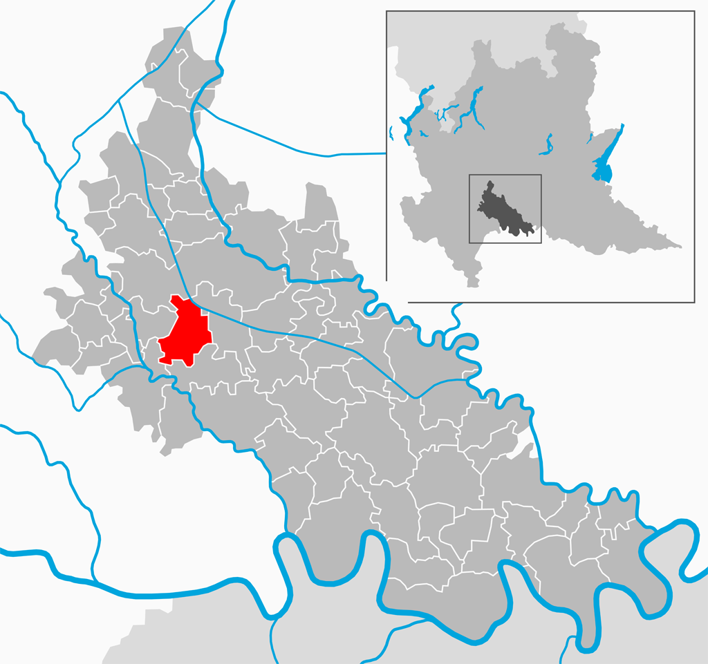 Il comune di Pieve Fissiraga nella provincia di Lodi